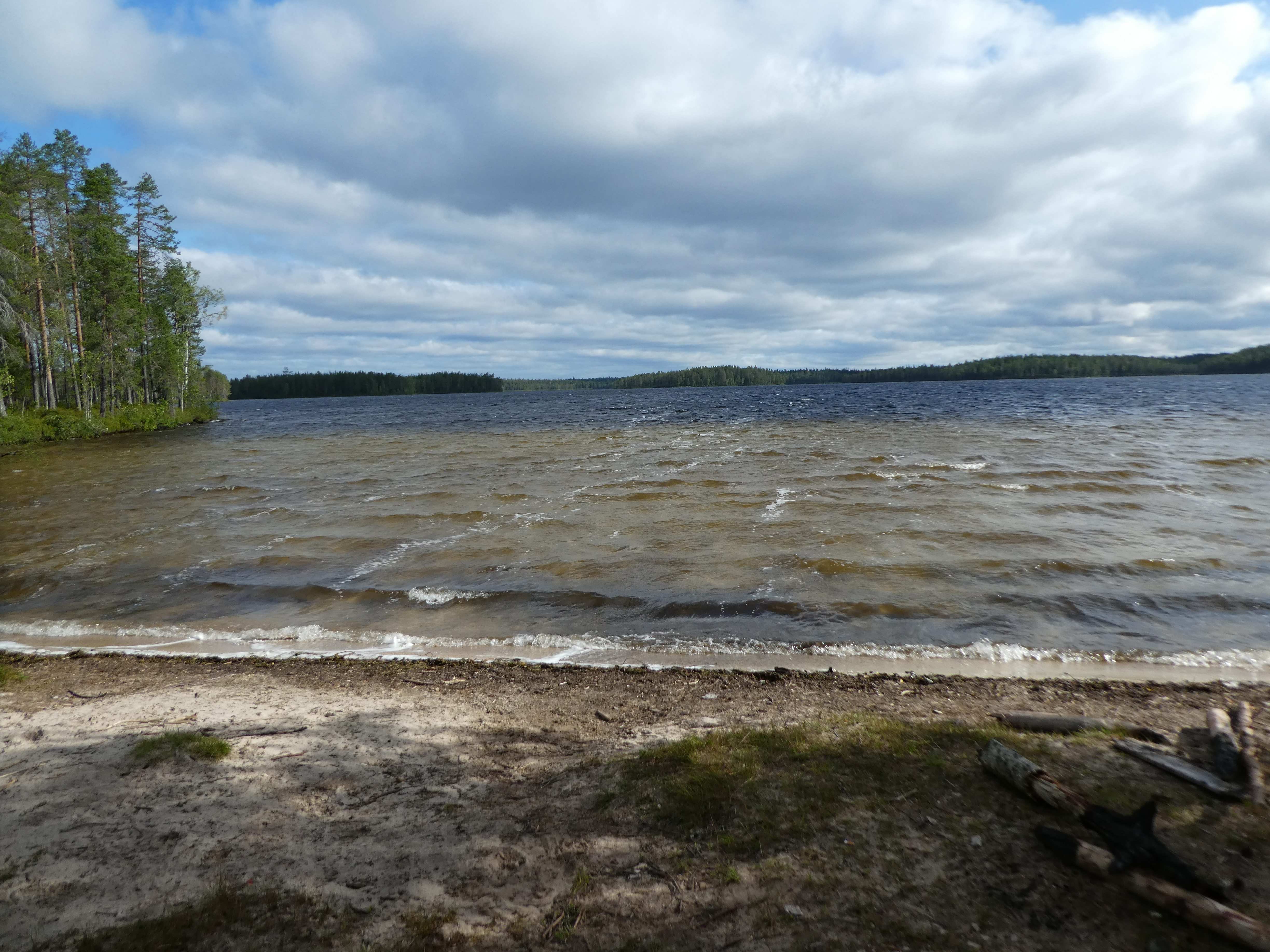 Kevättijärvi kaakkoistuulella